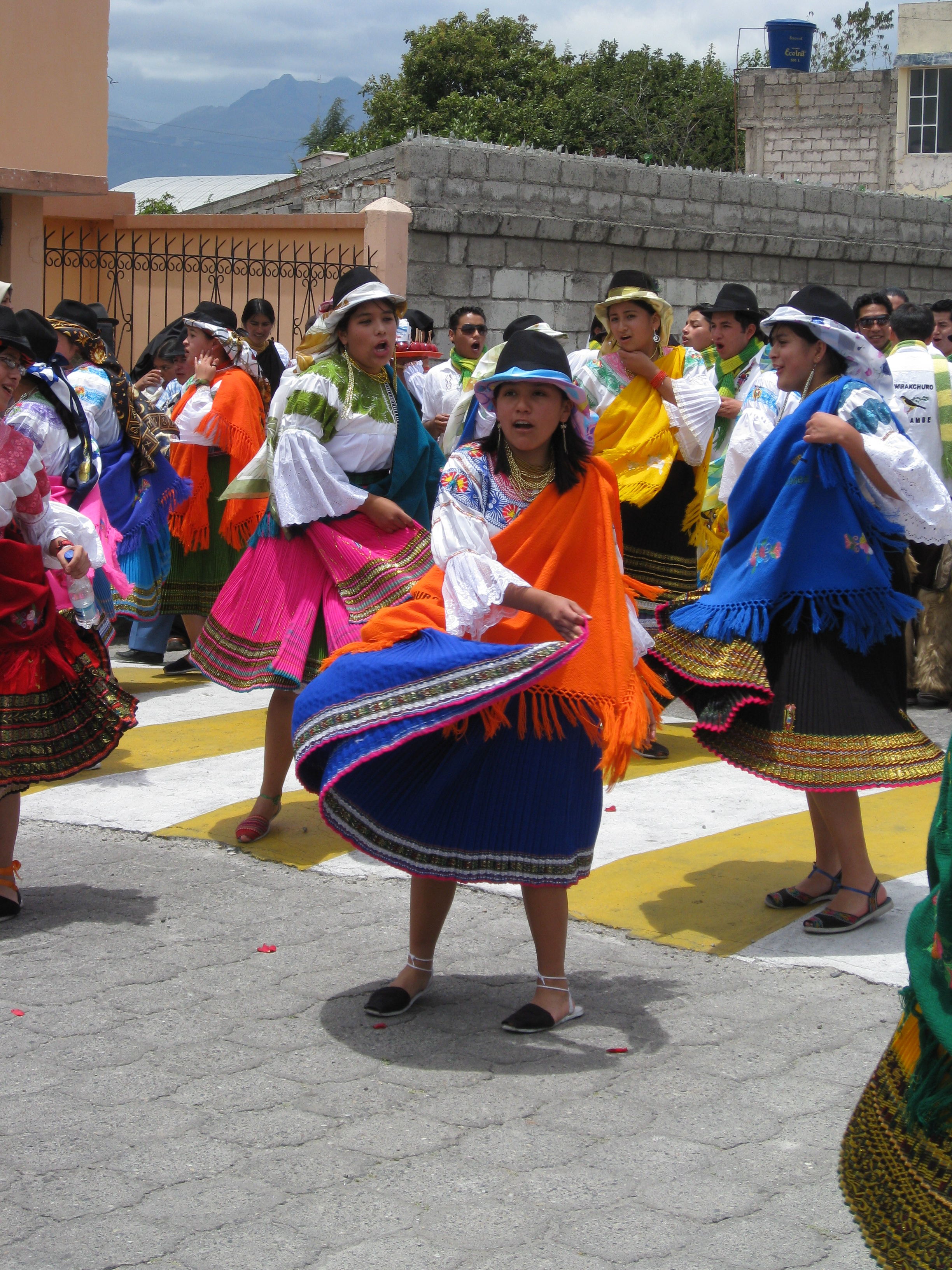 Cotacachi dancers